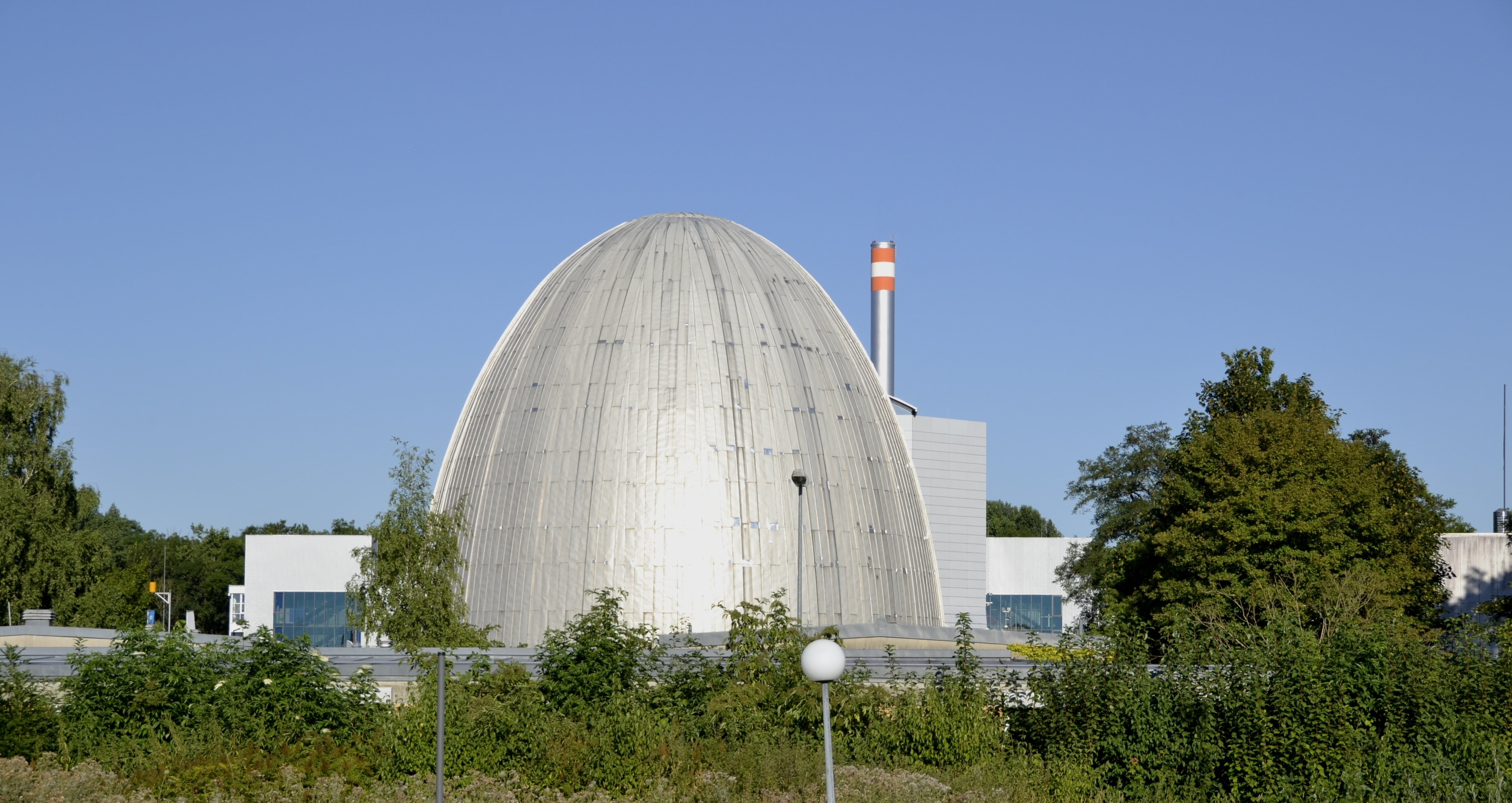 Der Forschungsreaktor München I (FRM I) oder das Atomei von Garching auf dem Gelände der Technischen Universität München (TUM).; Denkmalnummer 313341; Aktennummer D-1-84-119-13